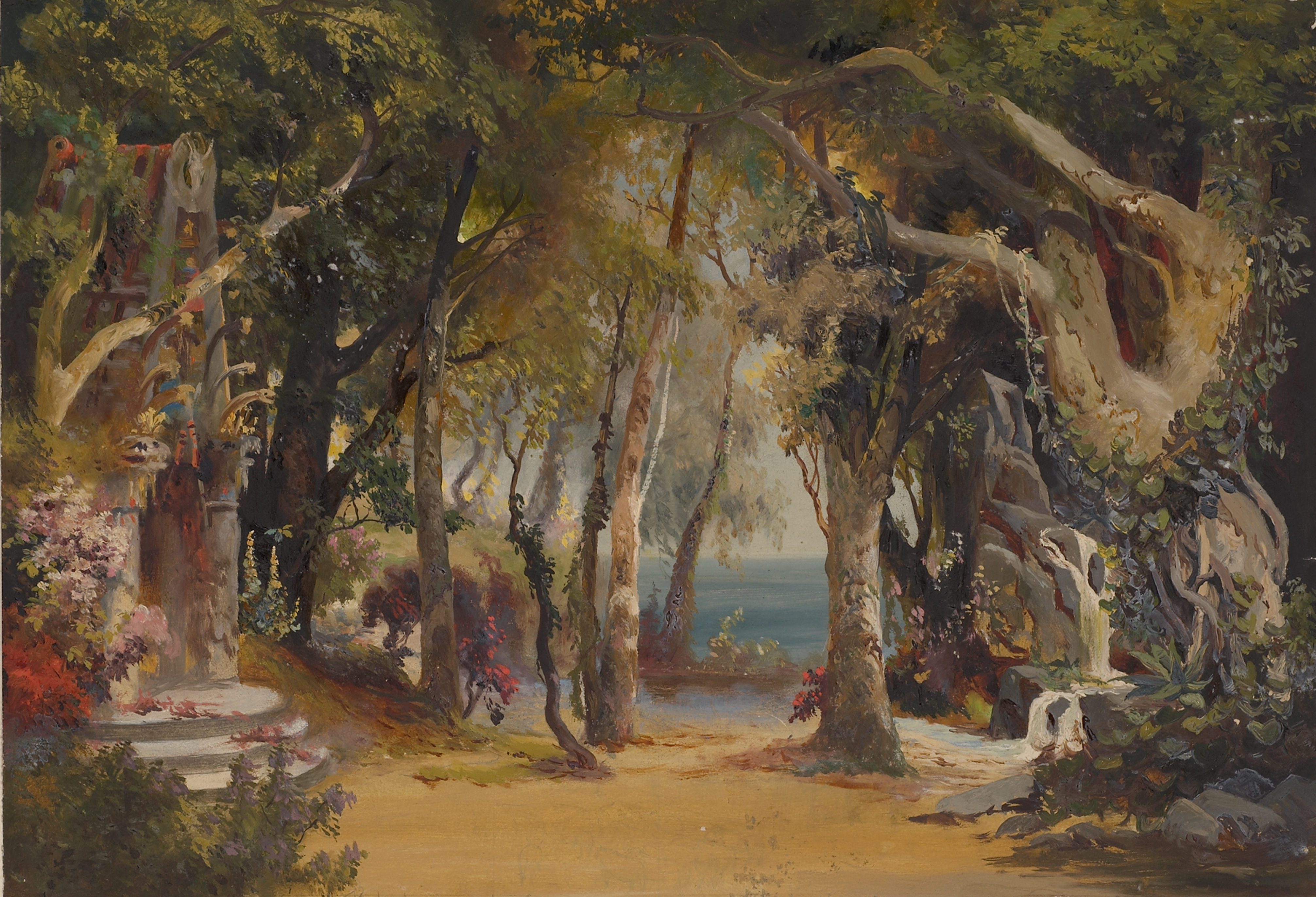 Zaubergarten, Bühnenbild der Oper Merlin zur Uhraufführung am 1886 von Hermann Burghart